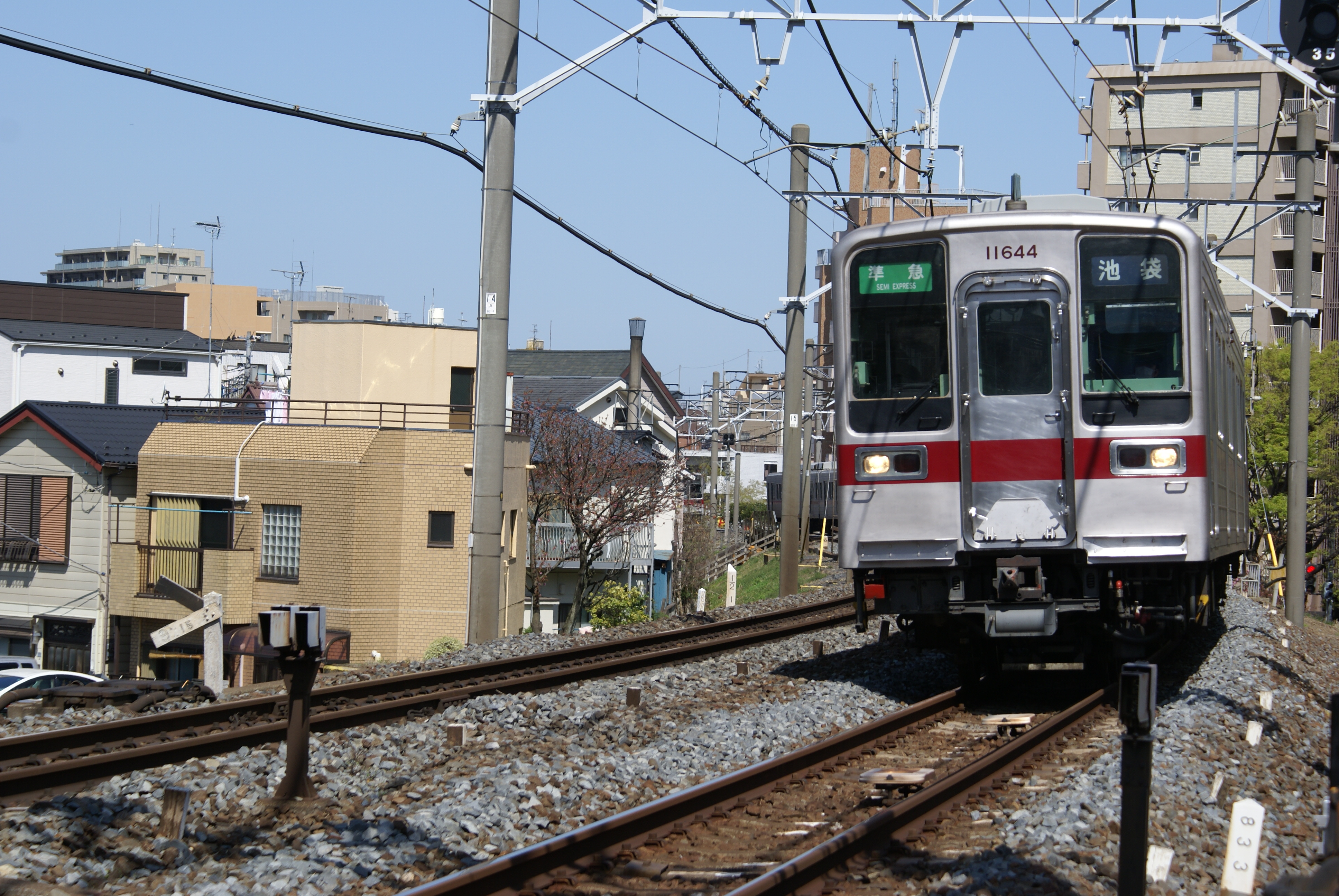 仲町を走る東武東上線列車